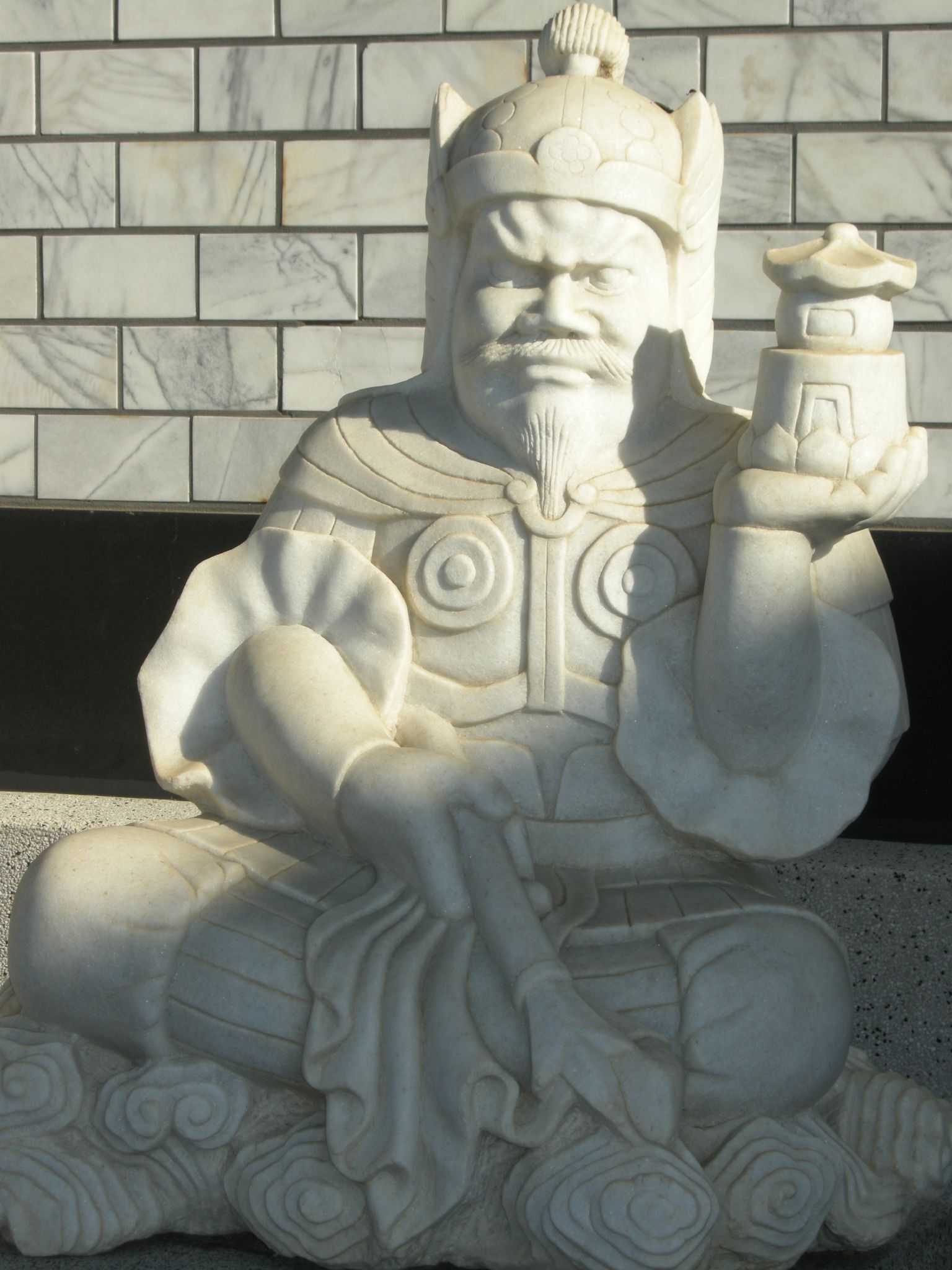 Dio coraggioso con armatura